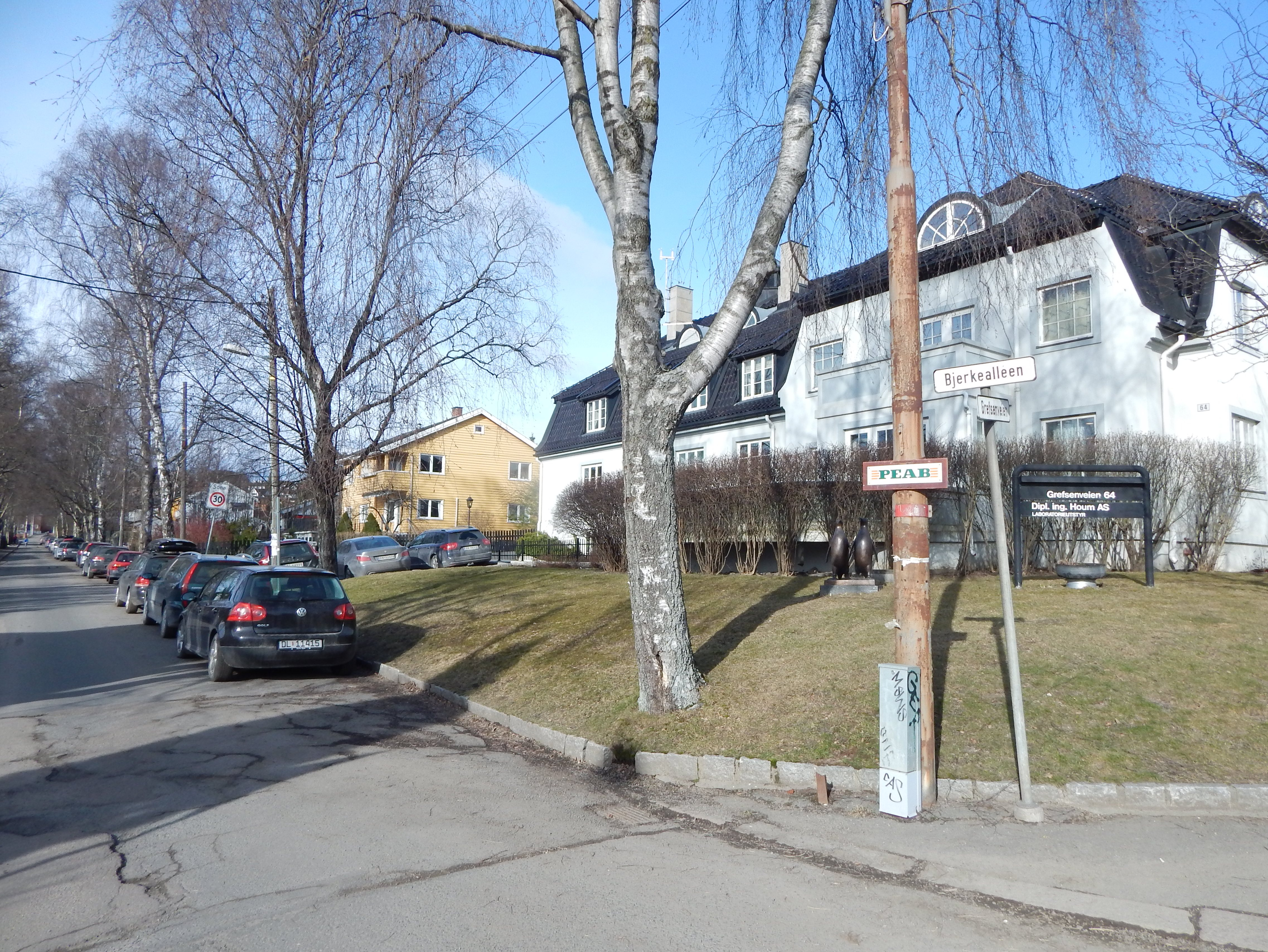 Bjerkealleen i krysset med Grefsenveien